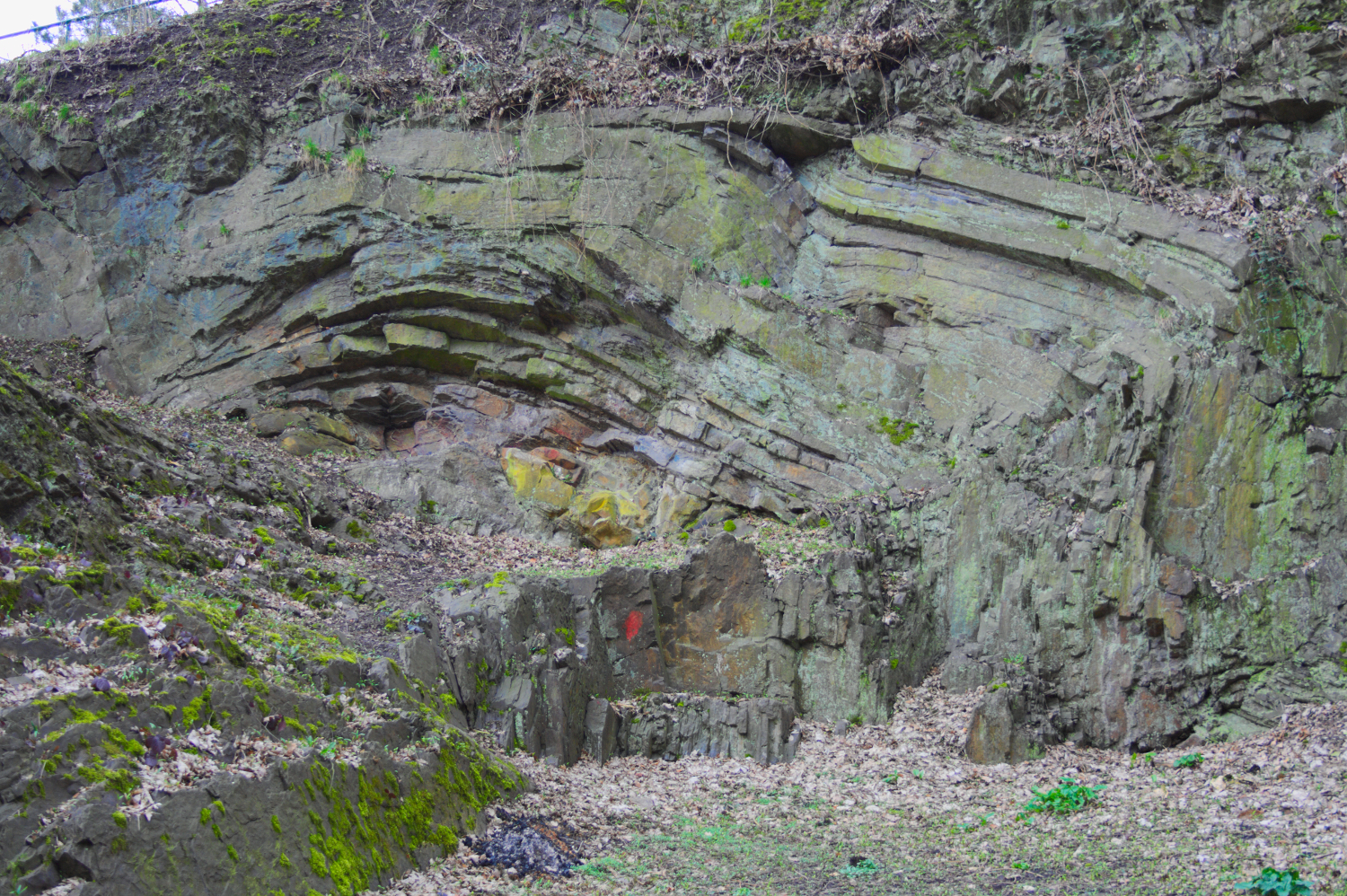 Geologischer Aufschluss (Sutan) in Essen-Werden (Klemensborn-Albermannstraße)